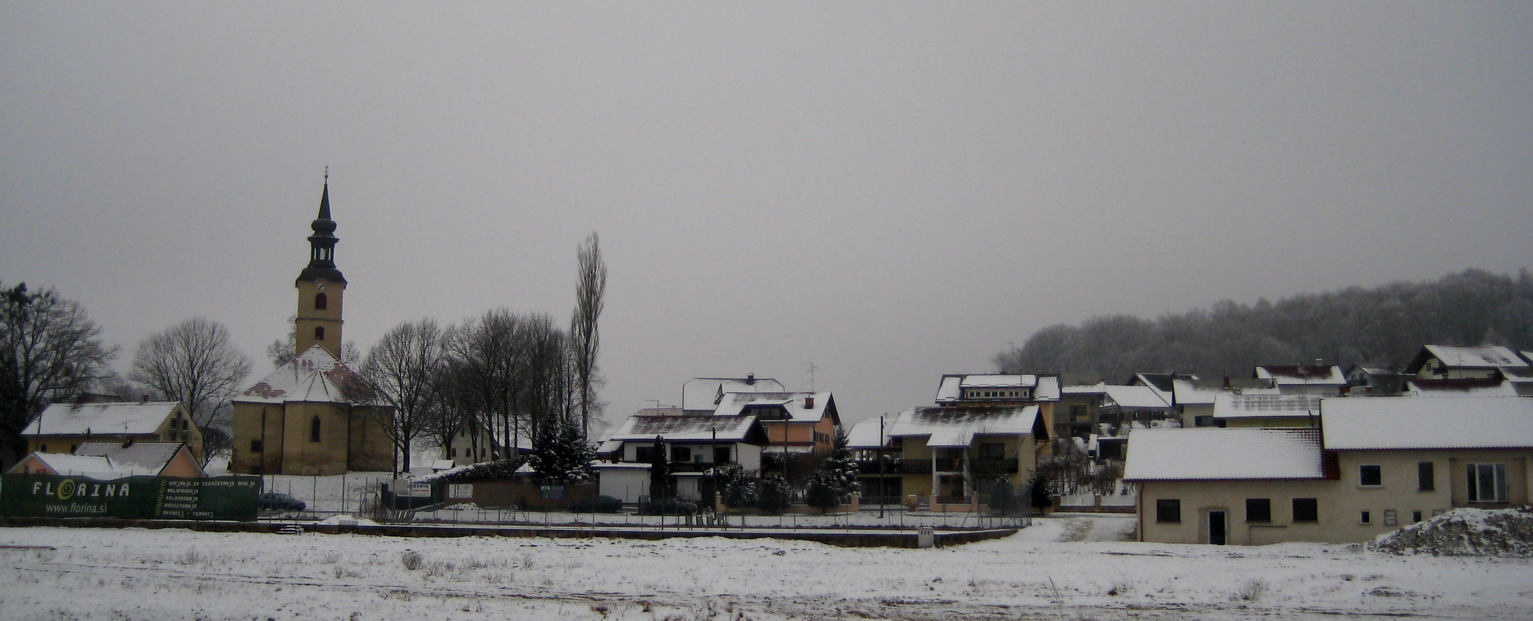 Benedikt, village in Slovenske Gorice, Slovenia